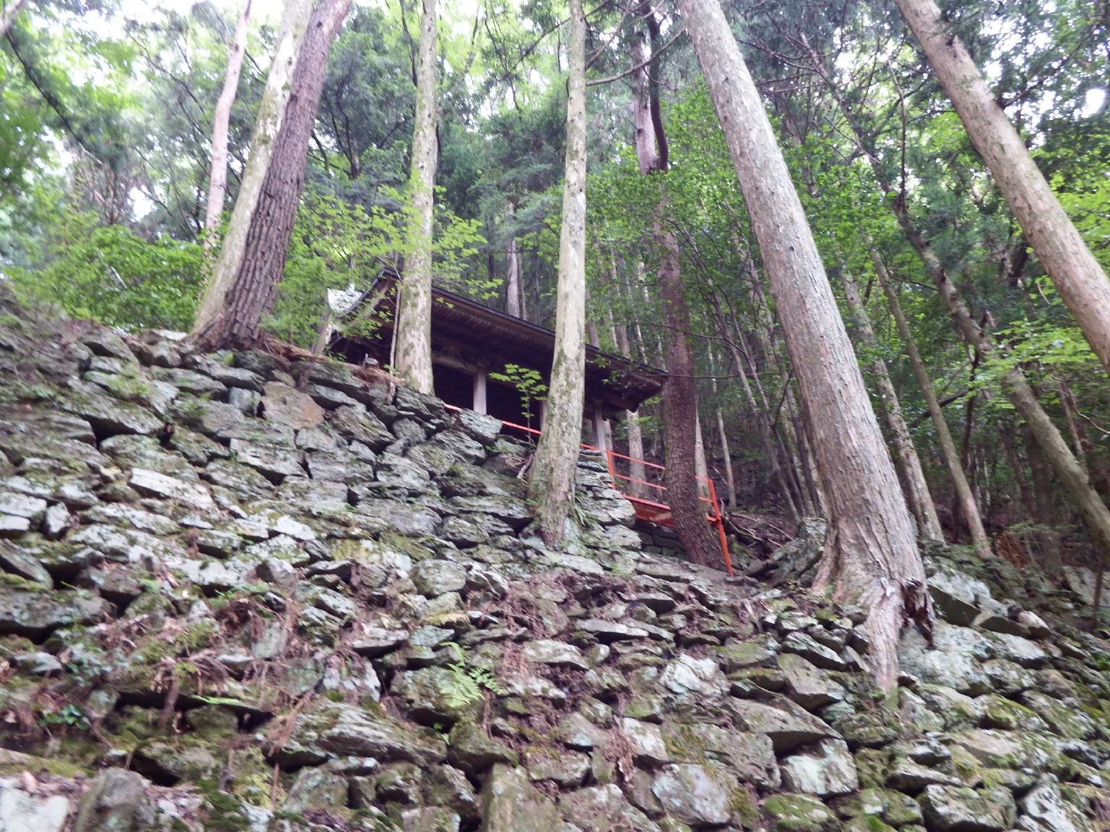 南光院本殿への道